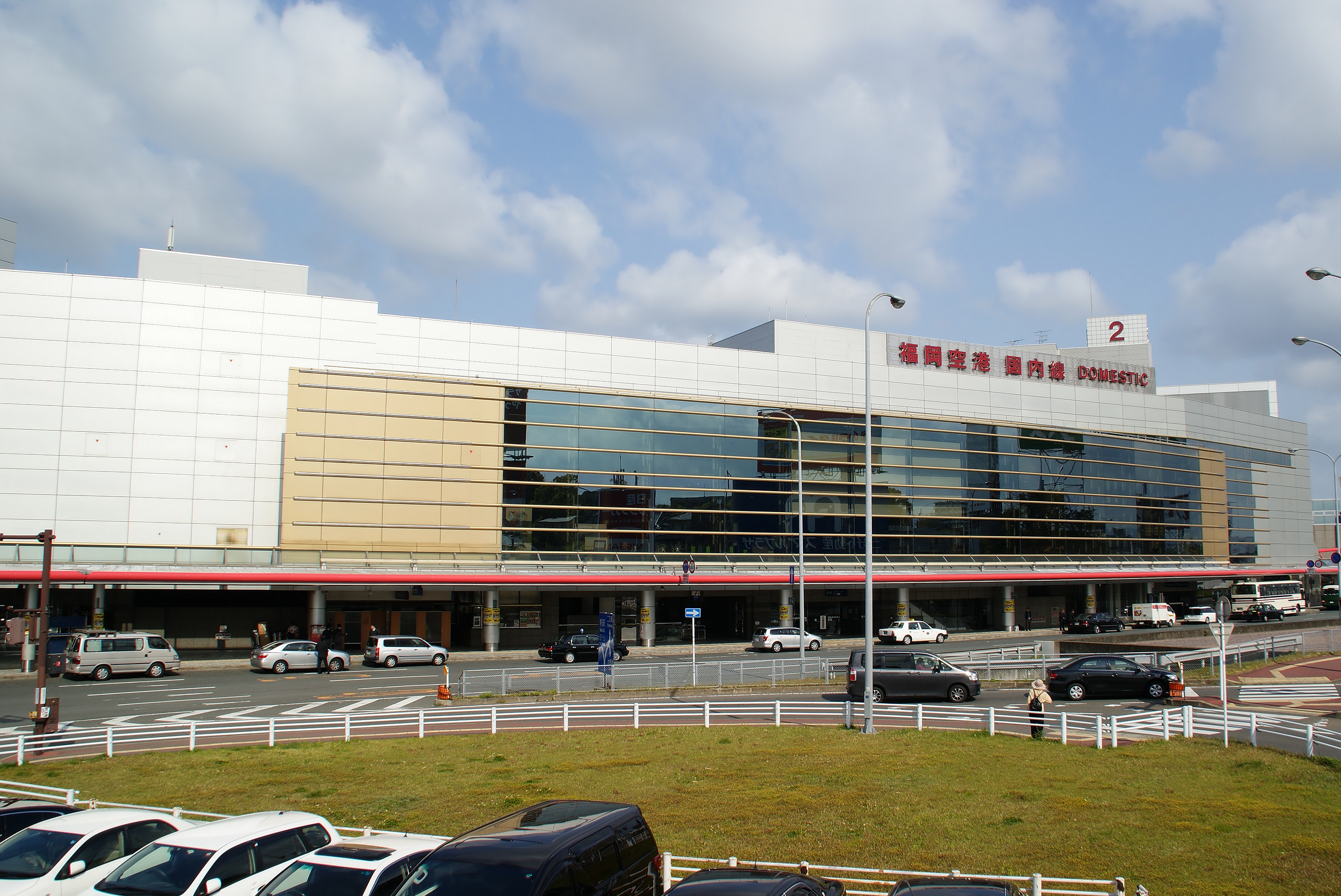 Fukuoka Airport, Terminal 2.(Hakata Ward, Fukuoka City, Fukuoka Prefecture, Japan)